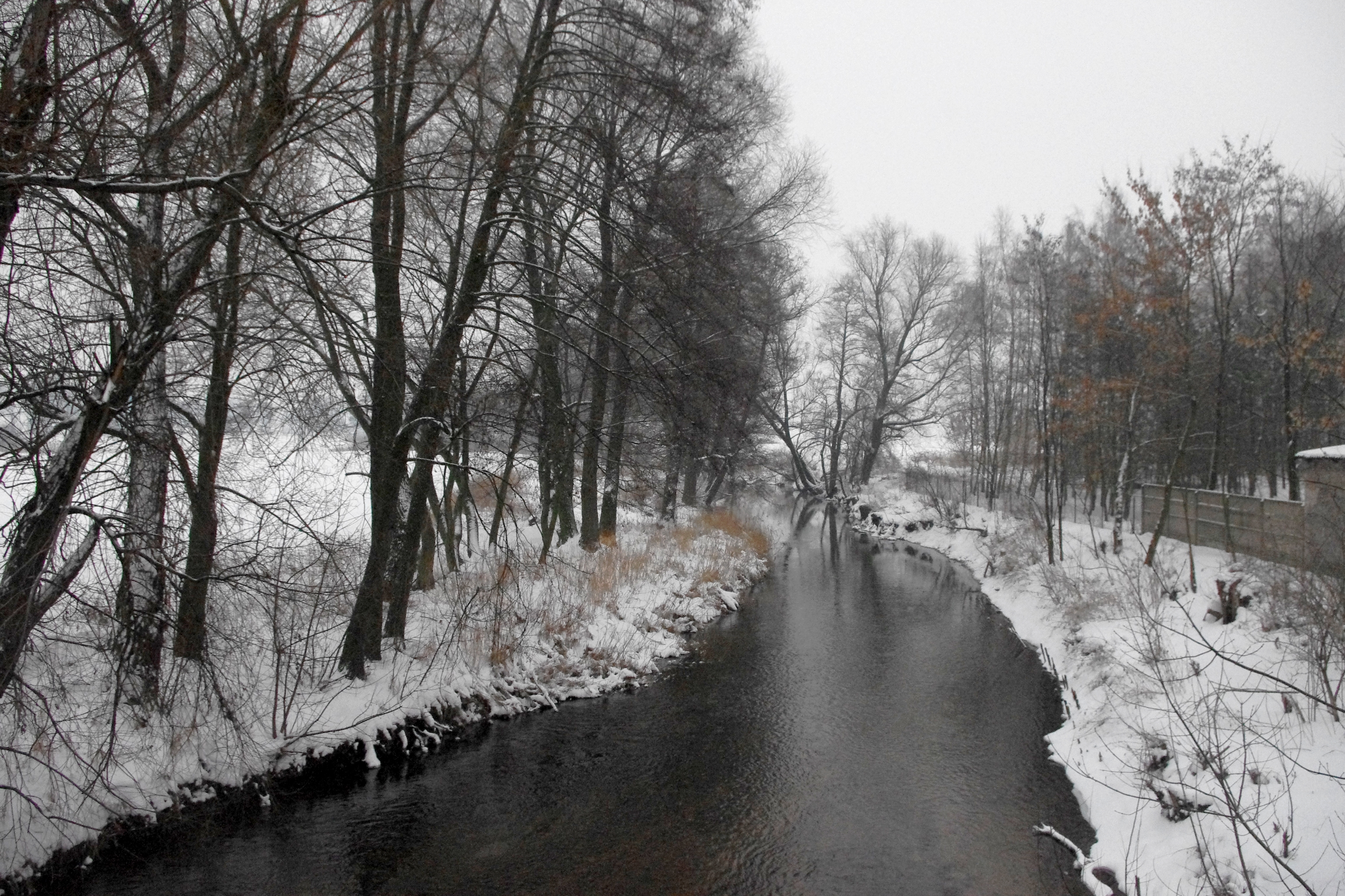 Rzeka Wolbórka, widok z mostu w Wolborzu (ul. Warszawska)